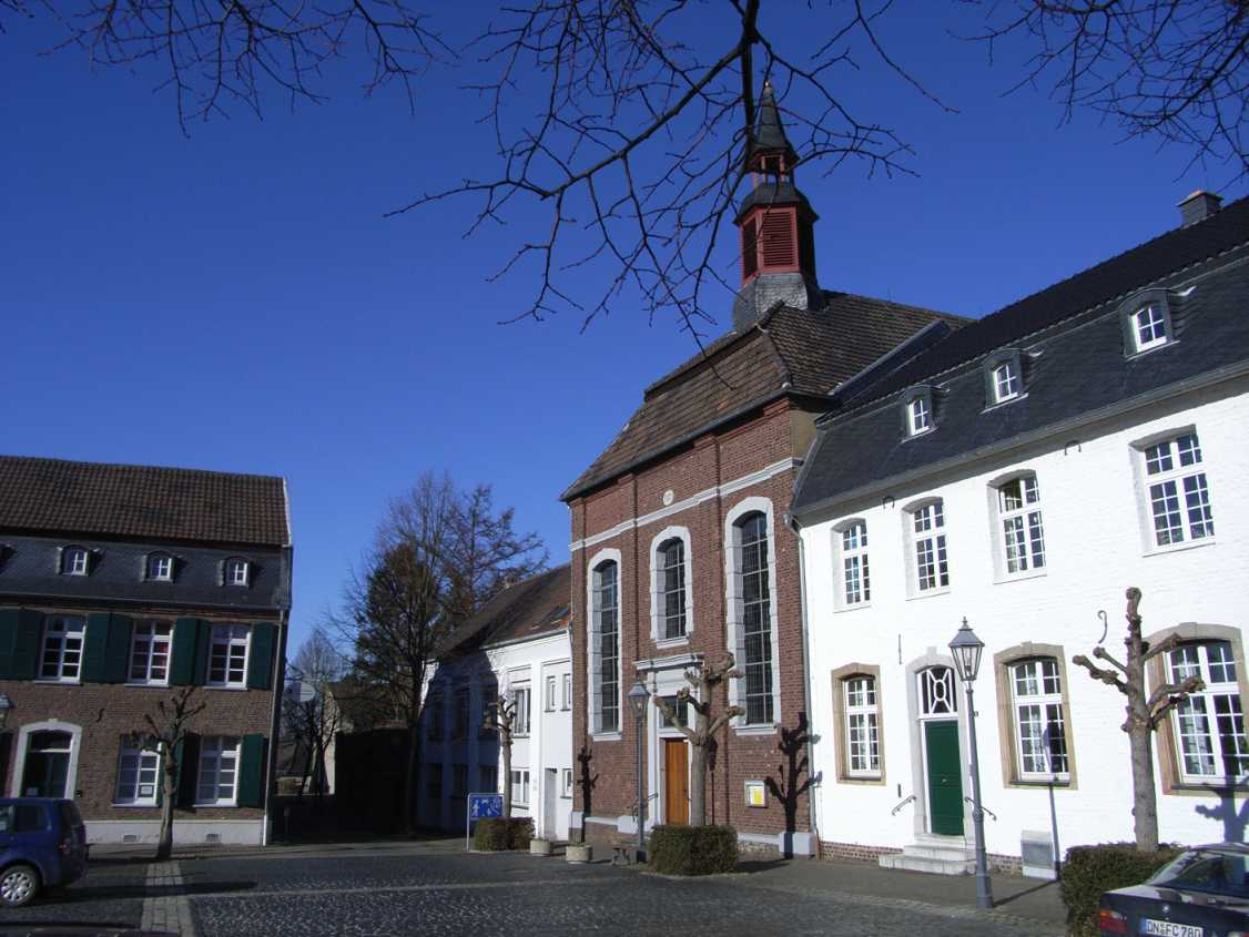 Altermarkt Linnich, ev. Kirche und Dohmhof (links)